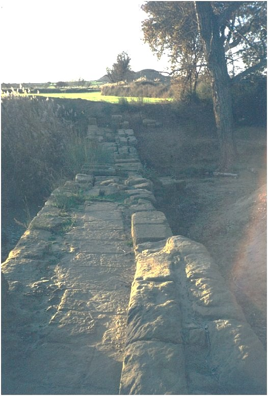 Acueducto romano quicena calzada